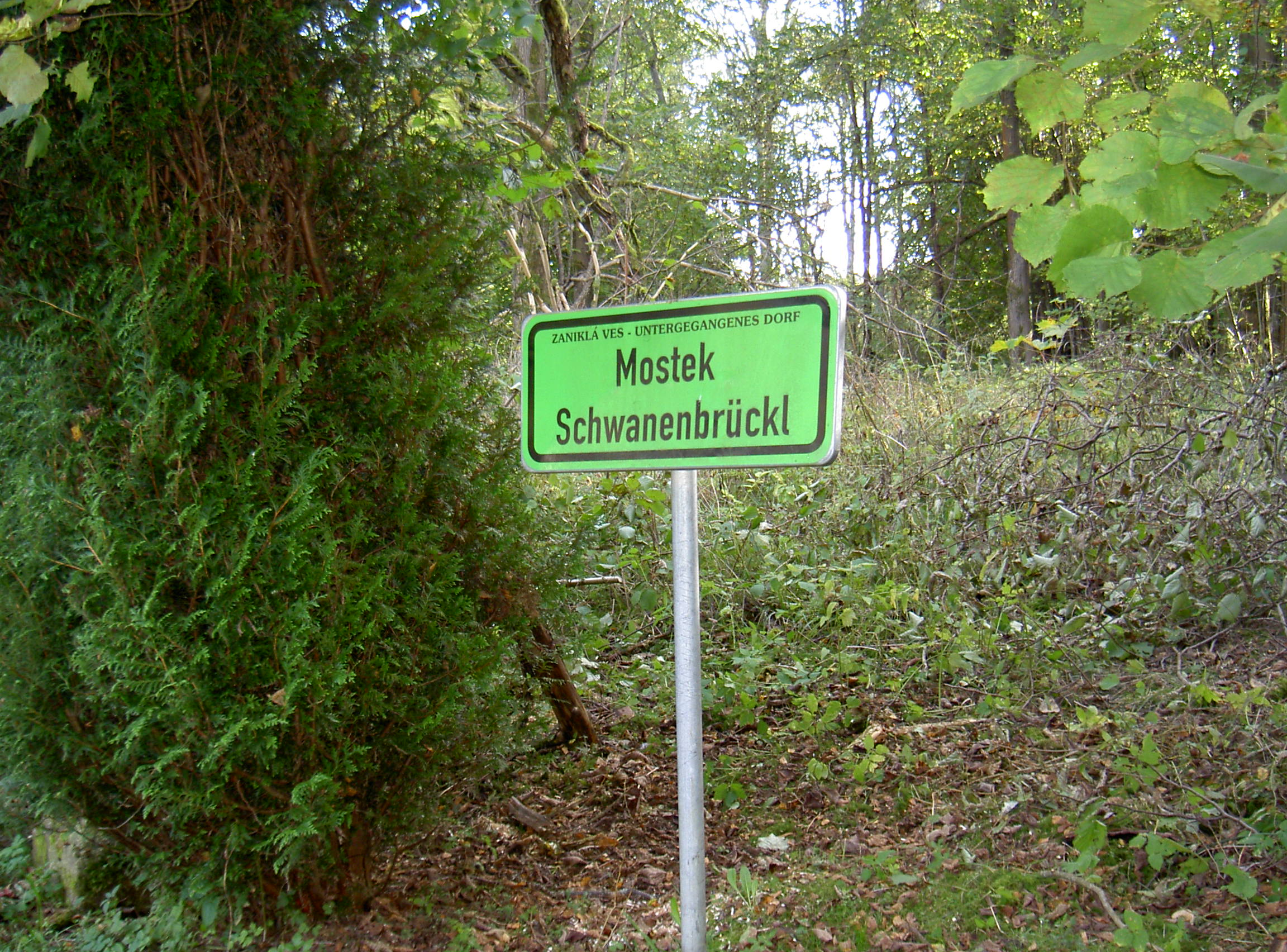 Mostek, Brücke über die Radbuza